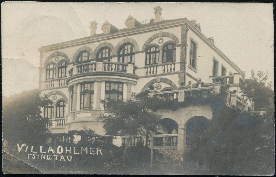 青岛胶海关税务司阿理文住宅